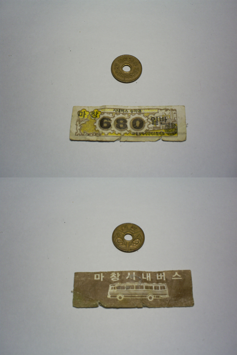 마창진 광역권의 시내버스에 사용했었던 토큰과 승차권 접사 촬영 사진 2008년 ko:12월 13일 촬영(2008년 ko:12월 14일 이어붙이기 작업)